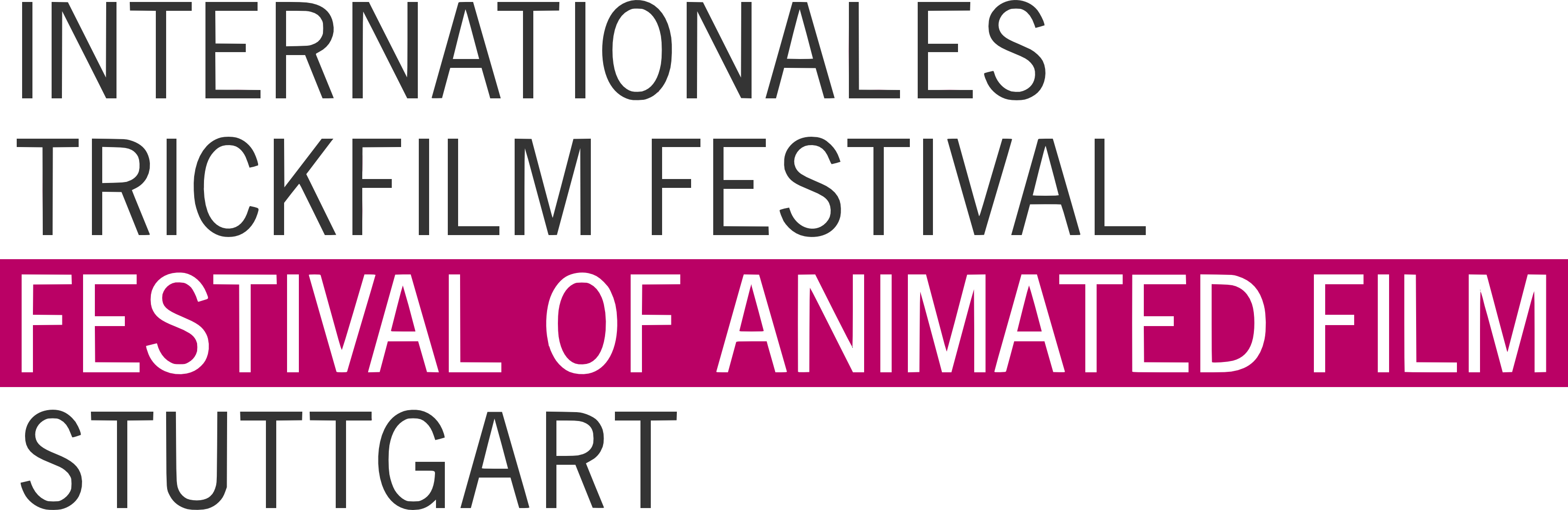 Logo Trickfilmfestival Stuttgart